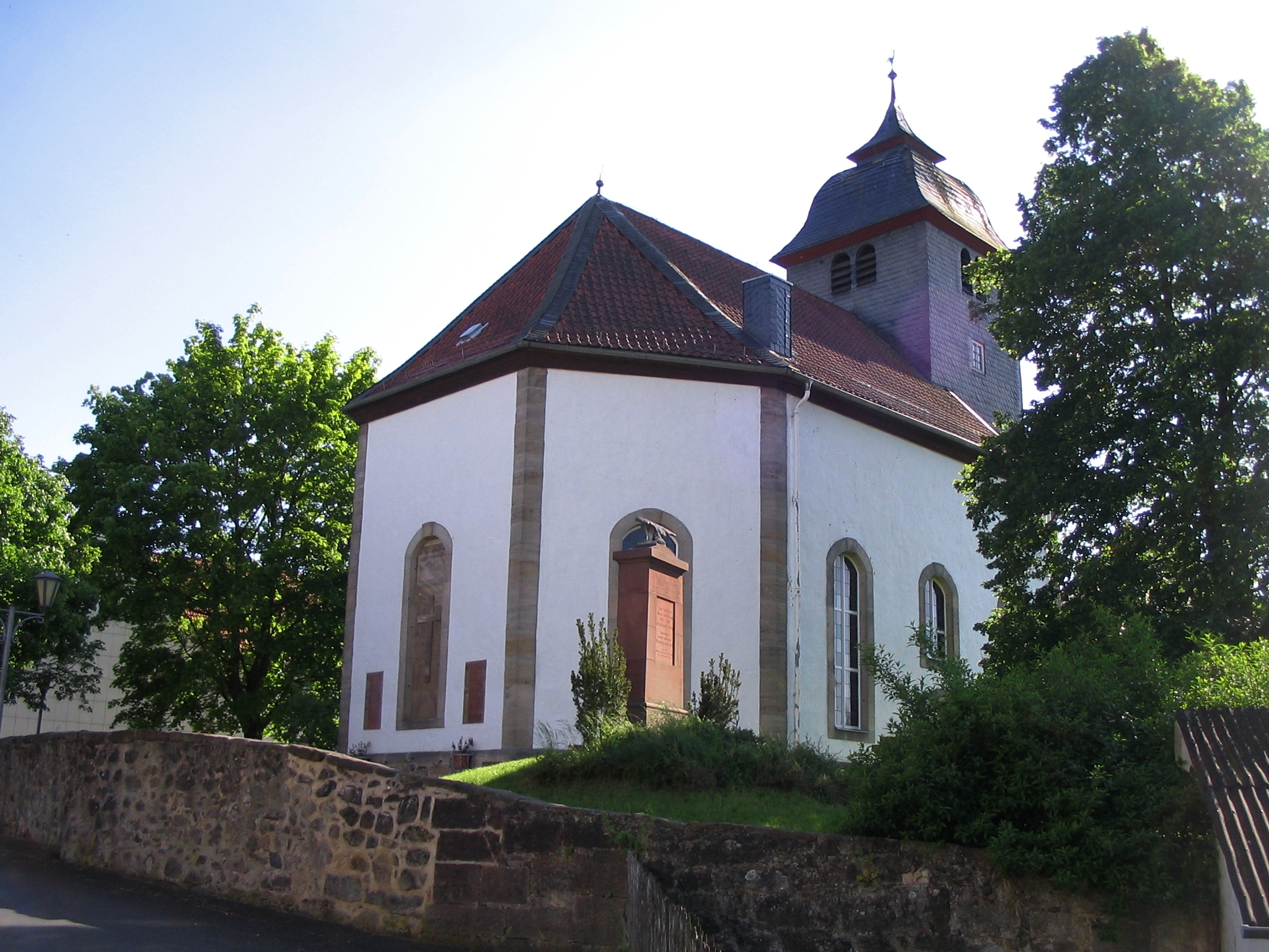 Die Dorfkirche von Niedergrenzebach (Hessen). Der ummauerte Kirchhof deutet auf eine Wehrkirche hin.